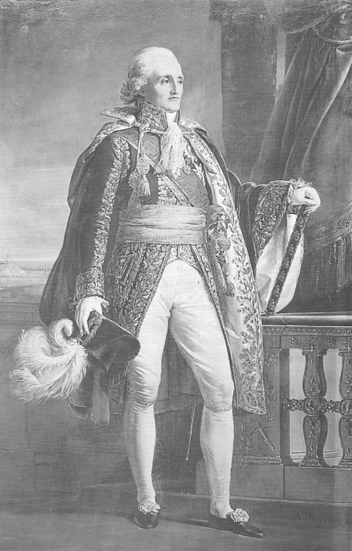 Le maréchal Bon Adrien Jeannot de Moncey (1754-1842). Il fut inspecteur général de la gendarmerie sous l'Empire et participa à la guerre d'Espagne.